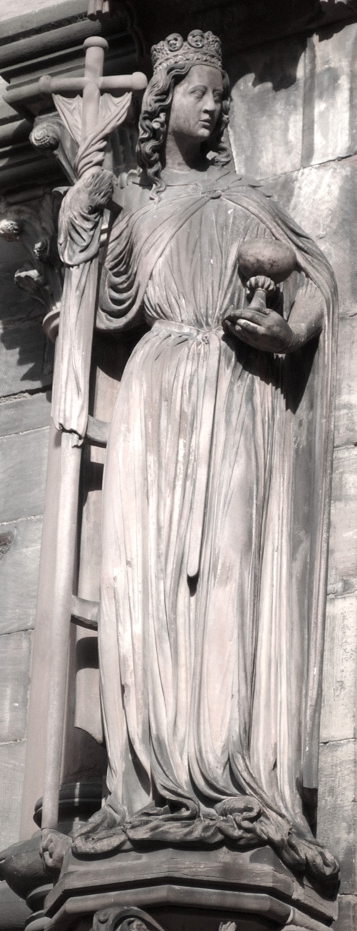 Strasbourg, Cathédrale Notre-Dame, L’Eglise.